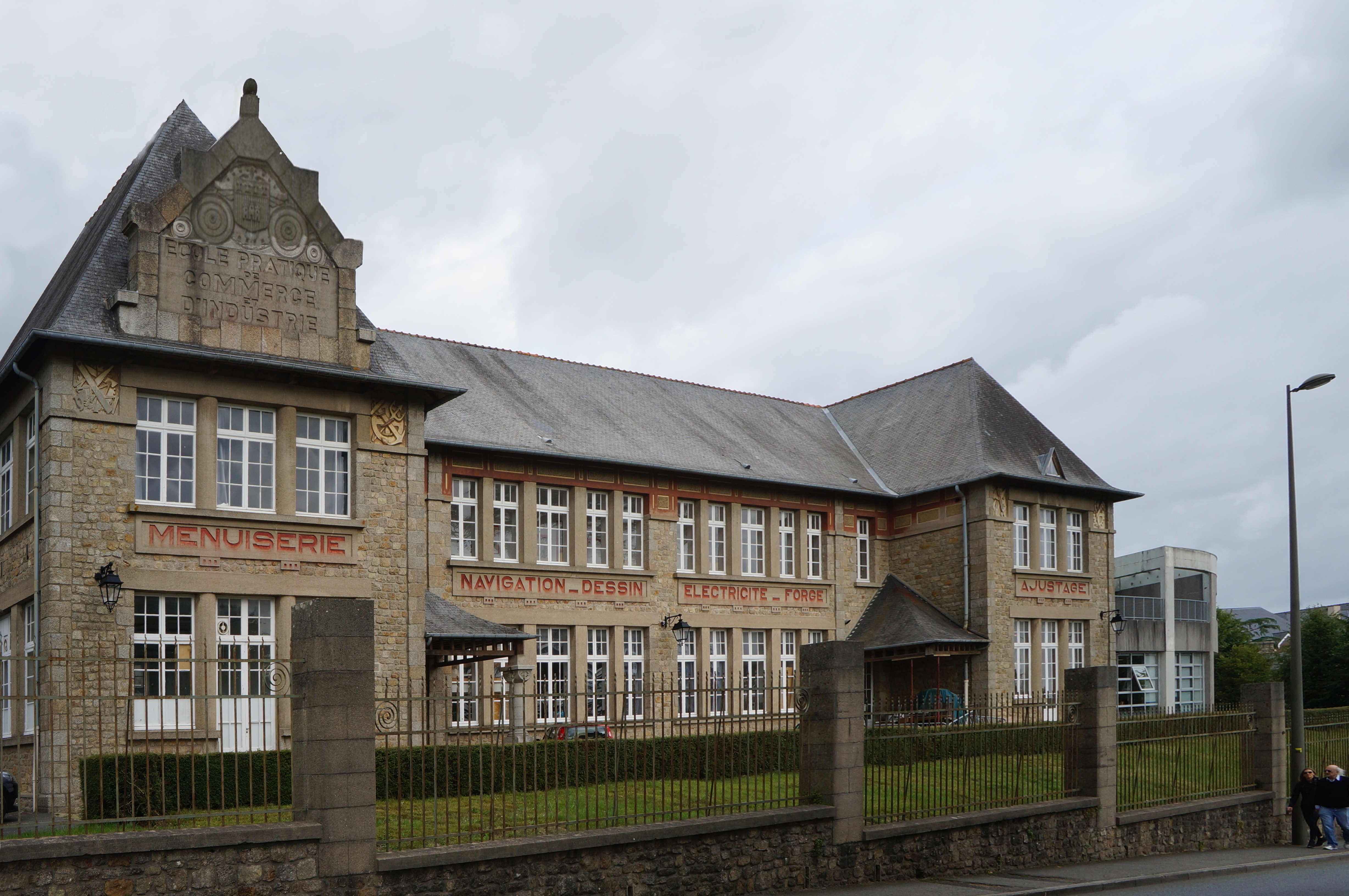 Le collège Roger-Vercel ancienne école pratique de commerce et d'industrie. Dinan Côtes-d'Armor Bretagne